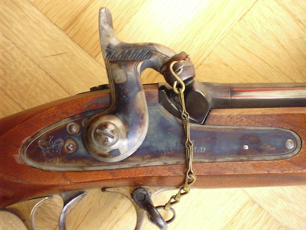 3BandEnfiled_2.jpg